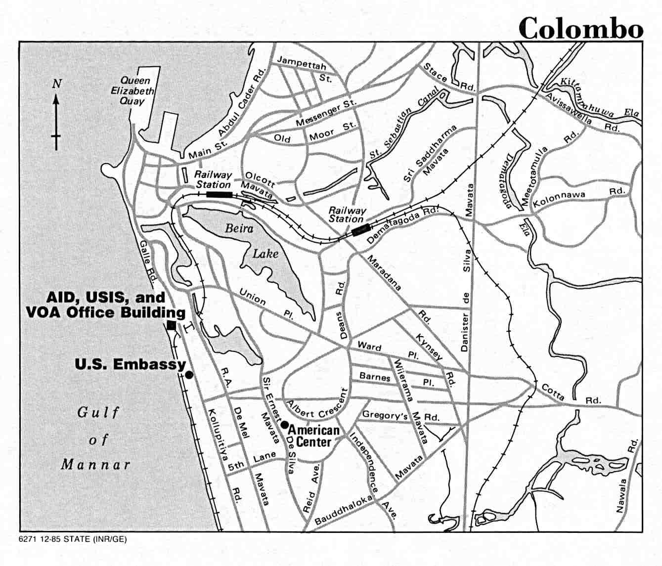 Colombo map